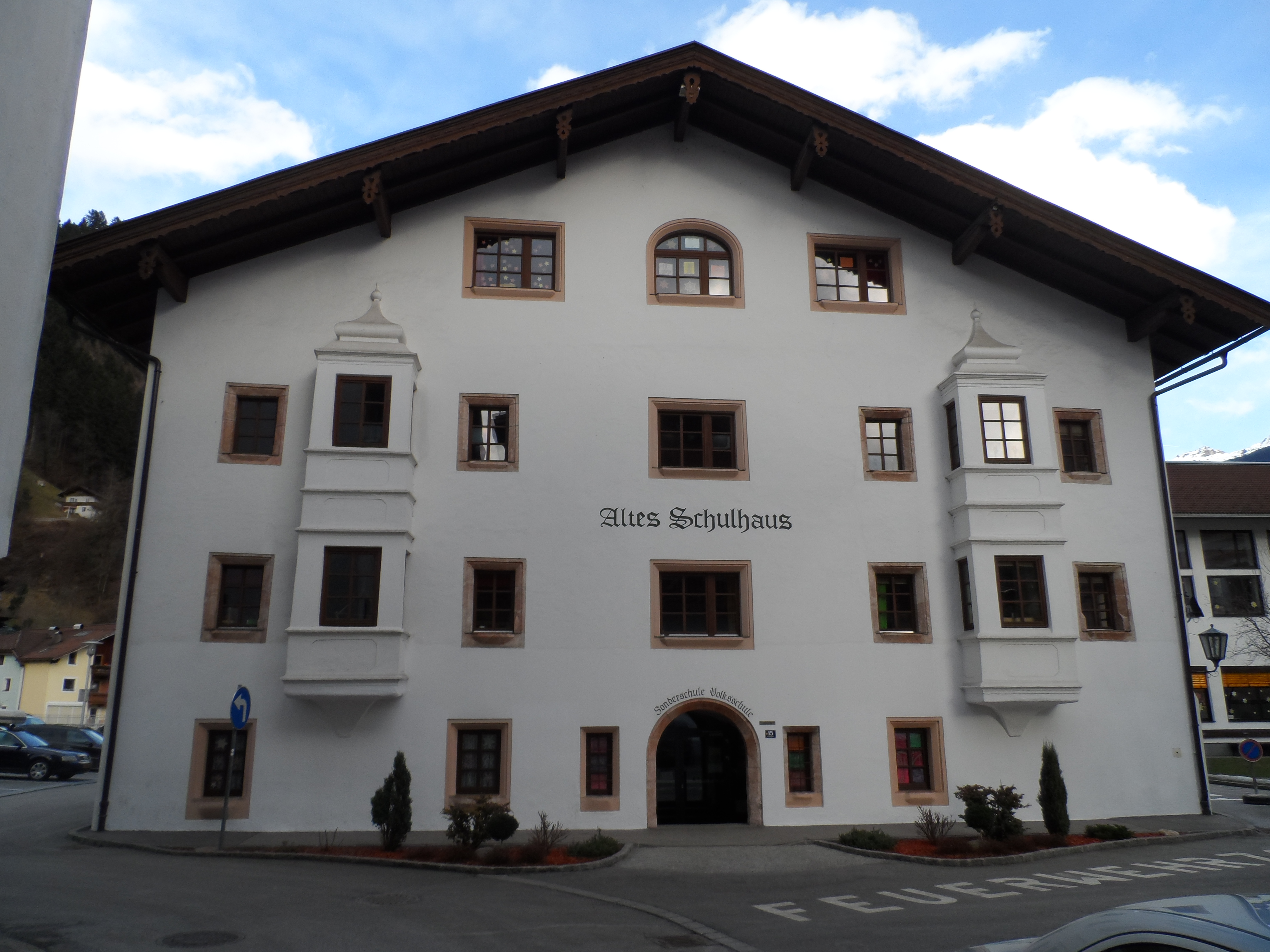 Alte Schule - Zell am Ziller